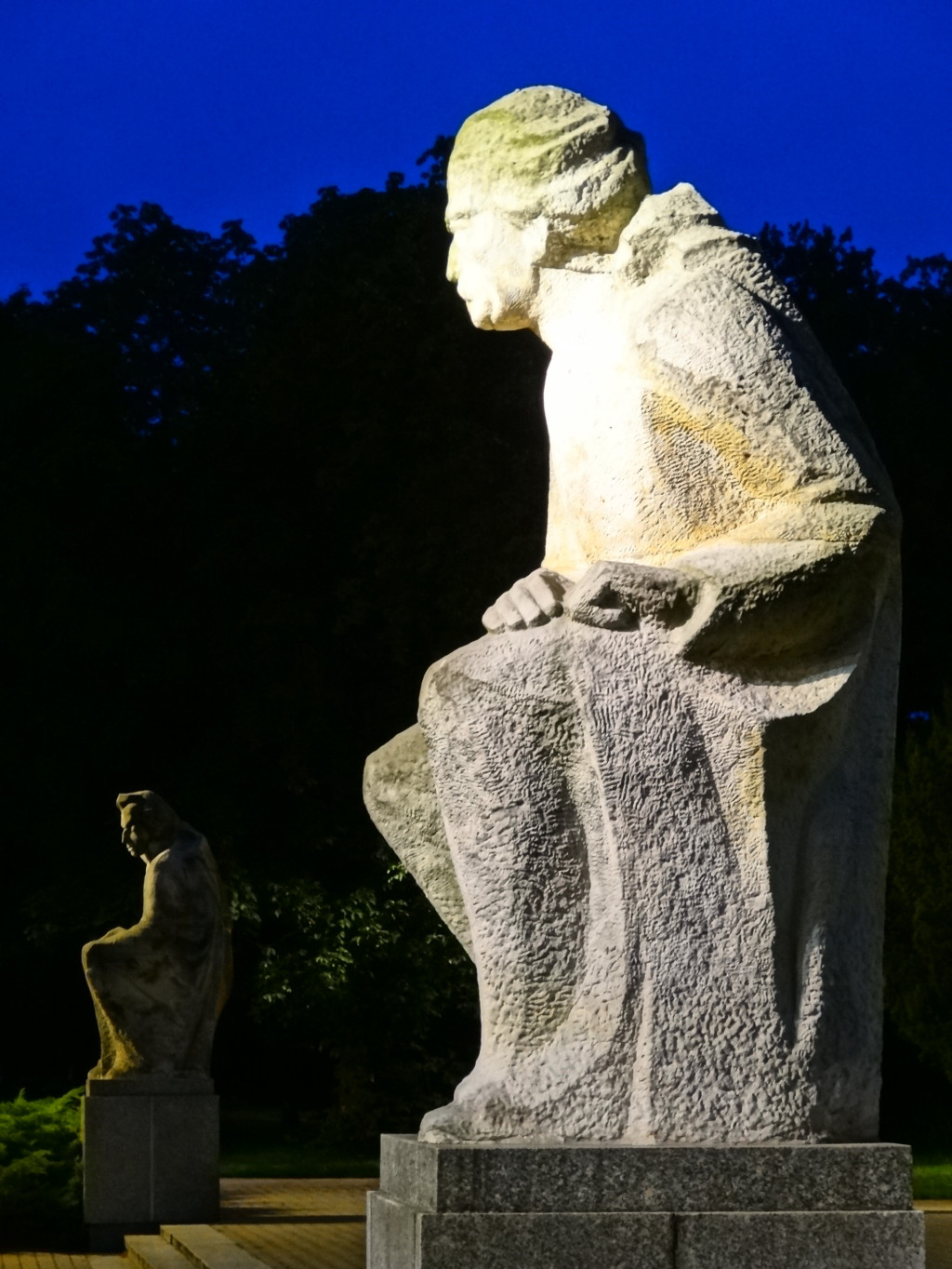 Rzeźby: Fryderyka Chopina i Ignacego Jana Paderewskiego przed Filharmonią Pomorską w Bydgoszczy